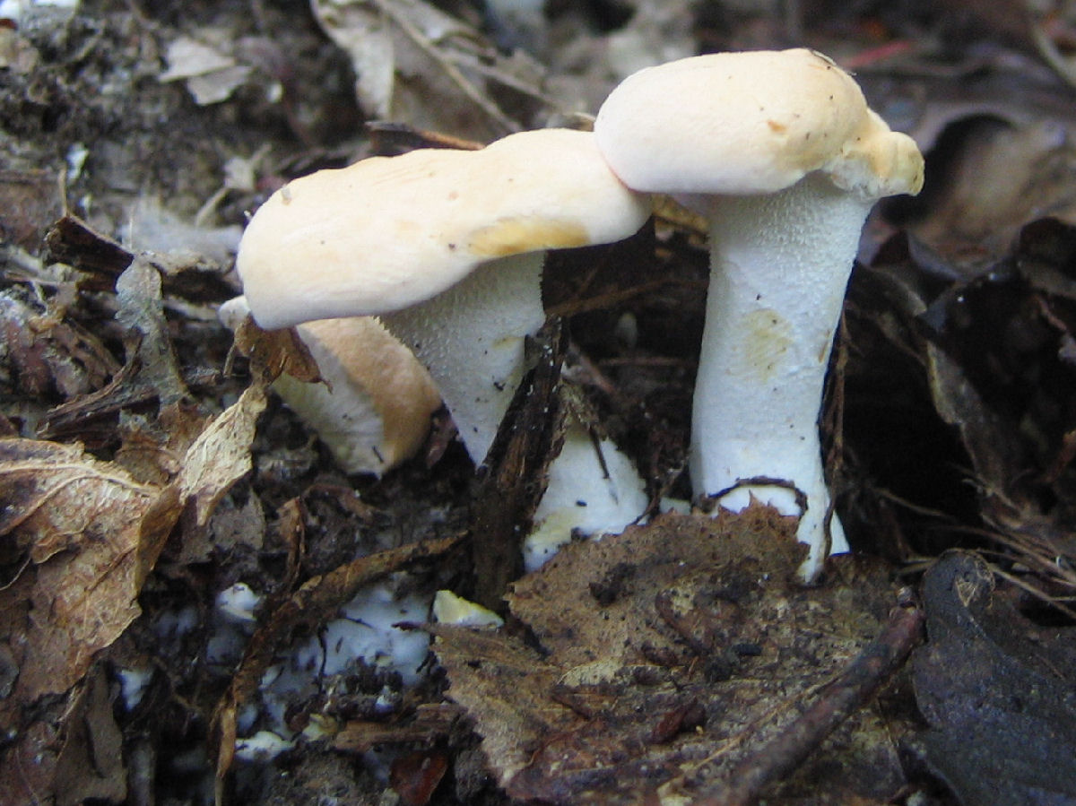 Pied de mouton